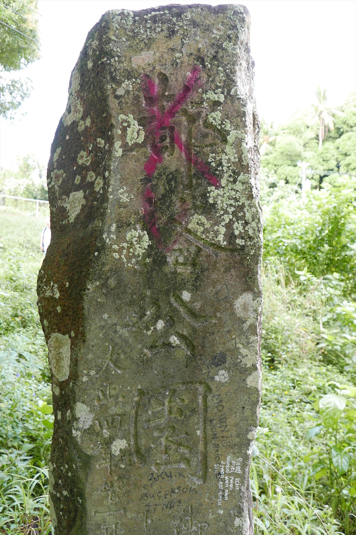 Tonoas Truk park